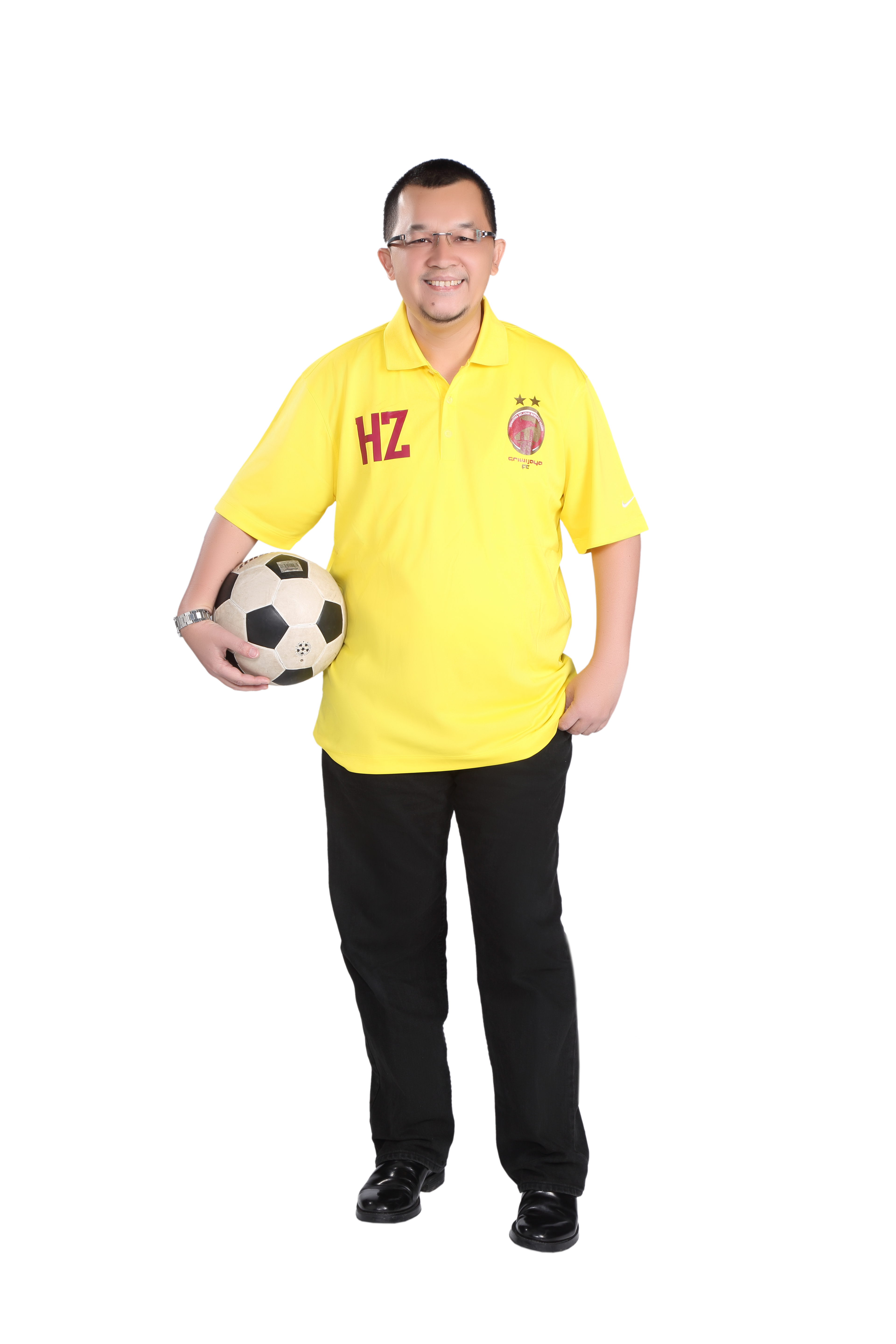 Pemuda dan Olah Raga, Konsen membangun komunitas olahraga dan pemuda di segala usia, terutama dalam terkait bidang sepak bola, baik persepakbolaan laki-laki dan wanita.